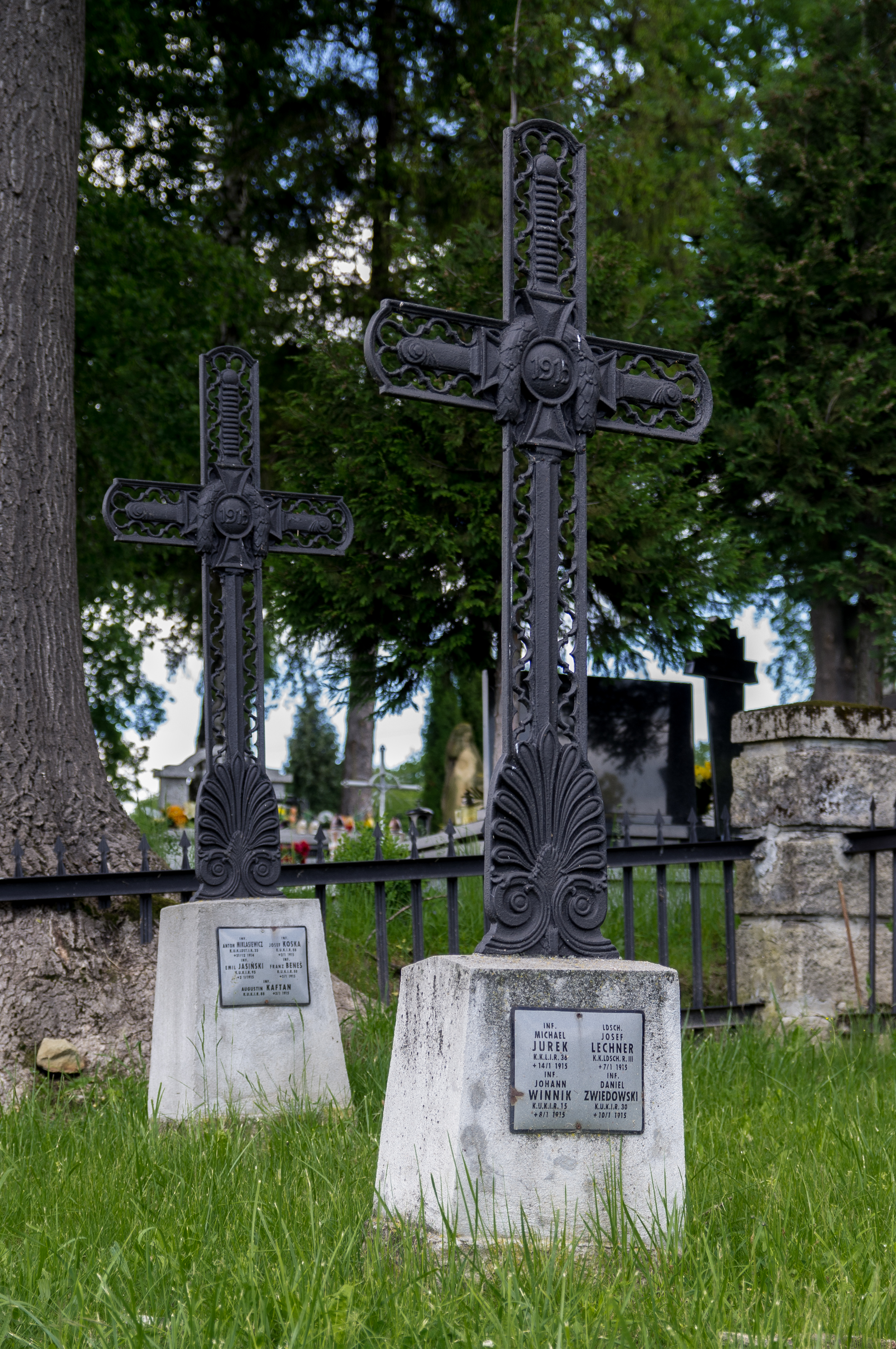 Domosławice